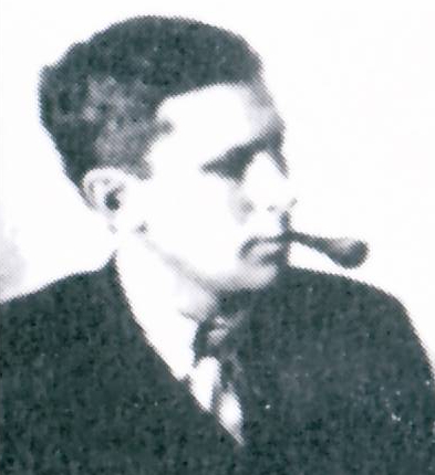 Дальневосточная группа "Творчество". Сидят (слева направо) Н. Асеев, С. Третьяков, В. Силлов, О. Петровская. Стоят В. Пальмов, Н. Чужак, М. Аветов, Н. Незнамов. Чита, 1922